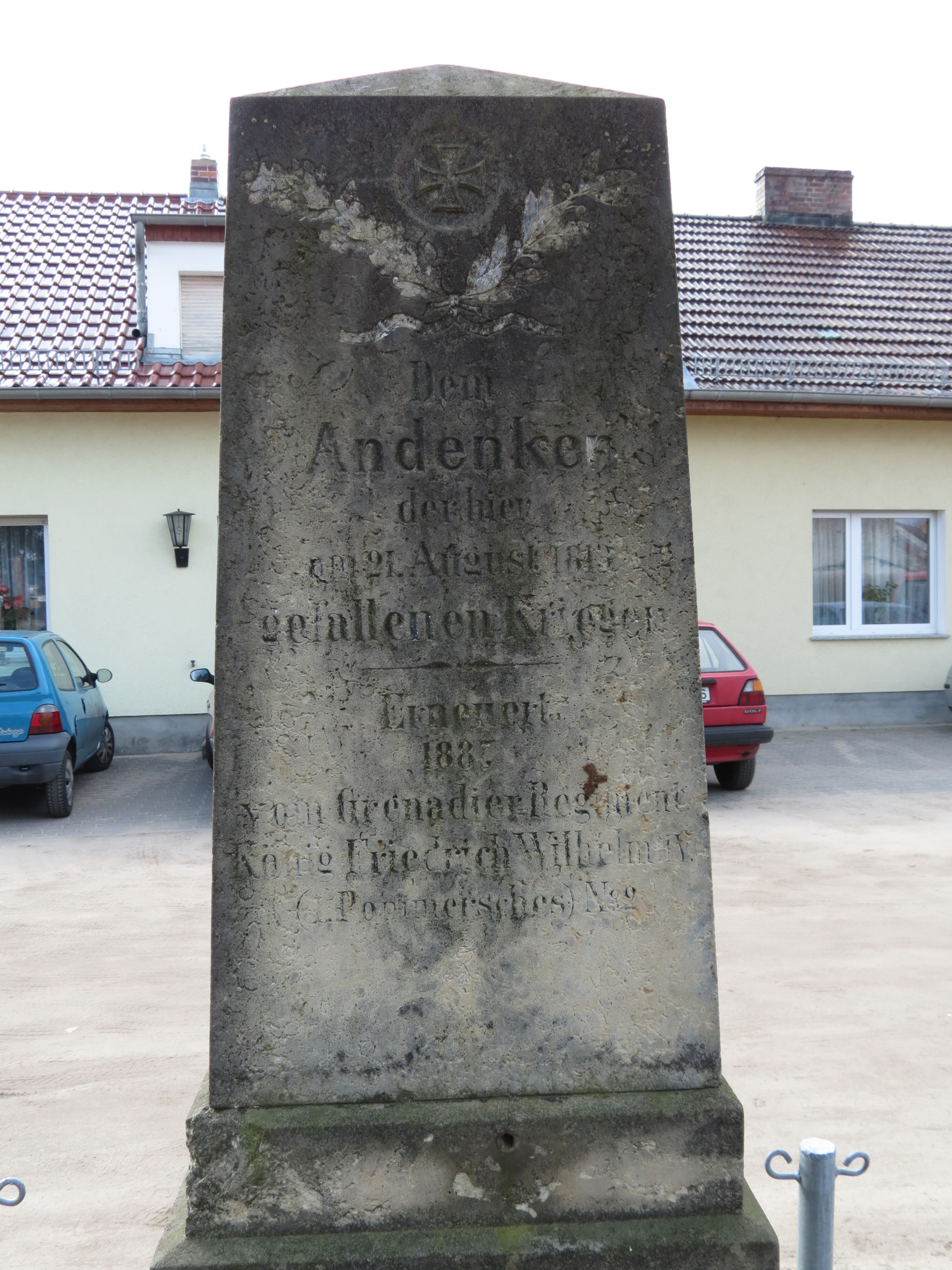 Alter Gedenkstein für die Gefallenen des Gefechts bei Mellensee am 21. August 1813, Mellensee, Gem. Am Mellensee, Lkr. teltow-Fläming, Brandenburg, Deutschland